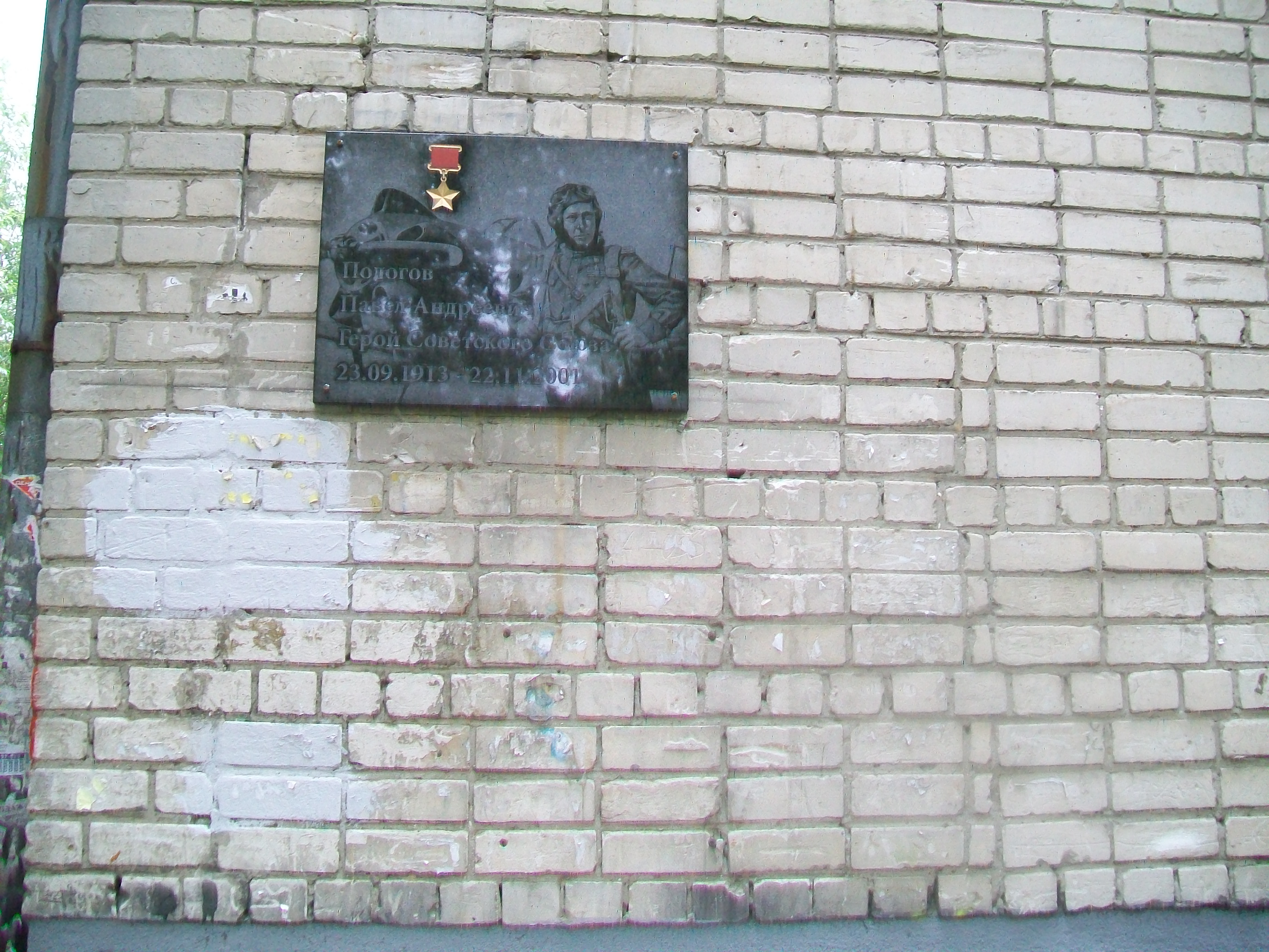 Мемориальная доска в память Героя Советского Союза Павла Андреевича Пологова. Екатеринбург, улица Шарташская, 12. Снимок сделан 21 сентября 2017 года